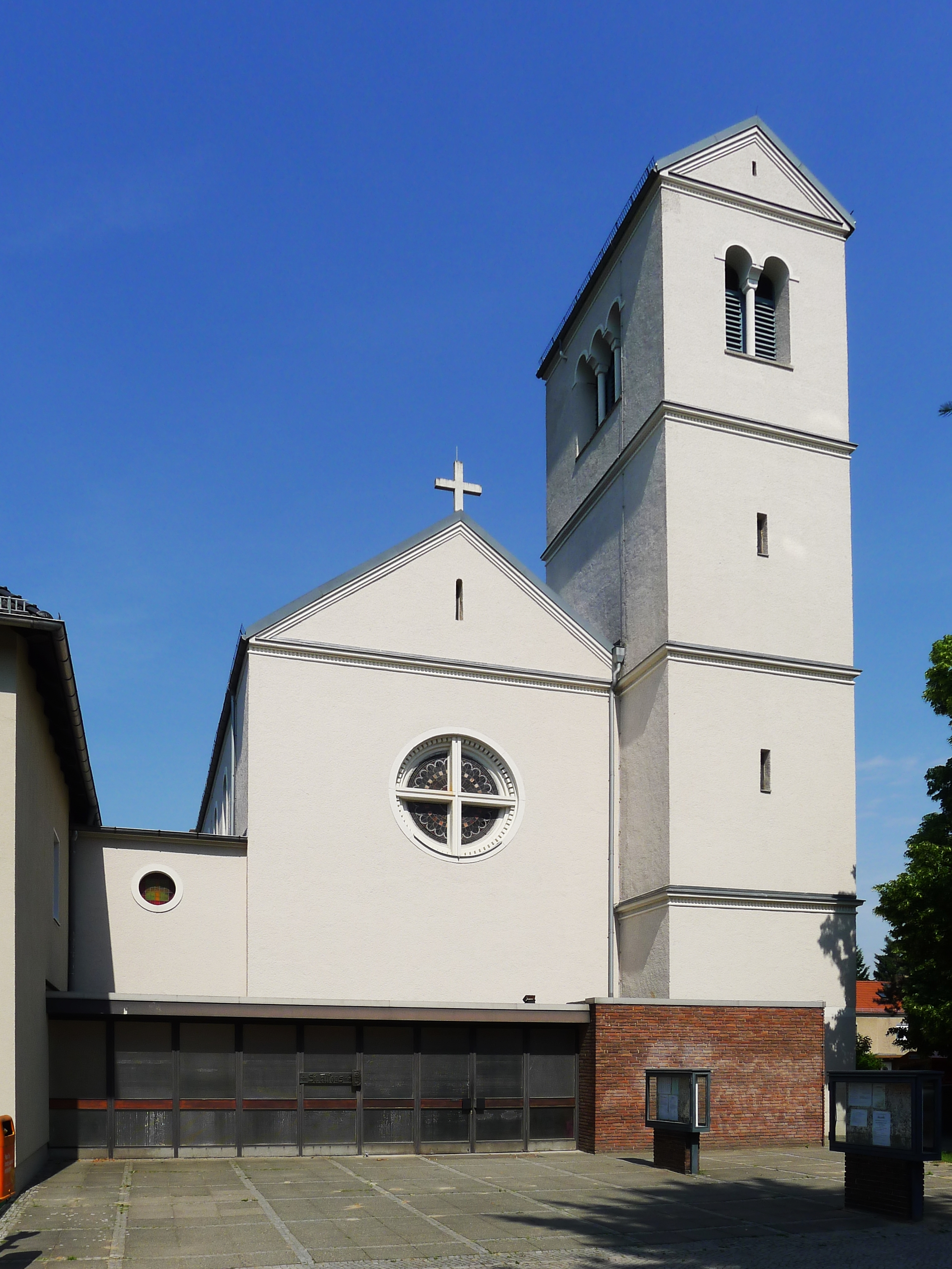 Portalseite und Turm